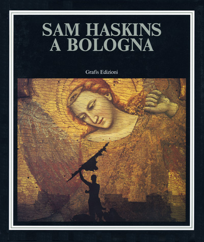 Titelbild des Bildbandes Sam Haskins à Bologna